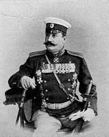 Подполковник Елец. Корреспондент «Нового времени» во время Русско-японской войны 1904—1905 гг.